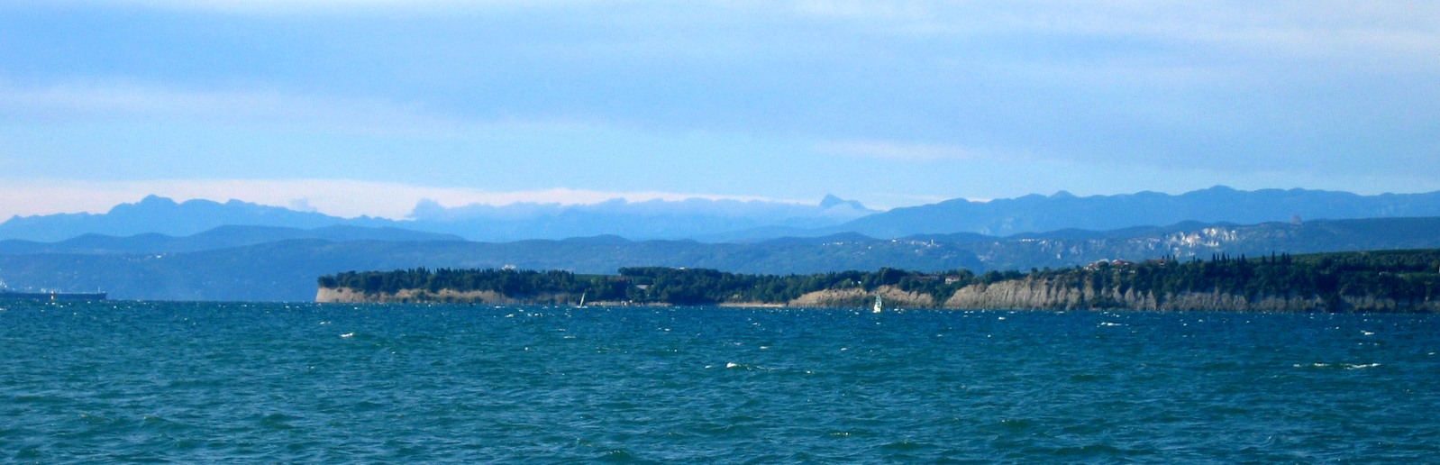 Debeli Rtič, peninsula in Slovenia (Koper bay)